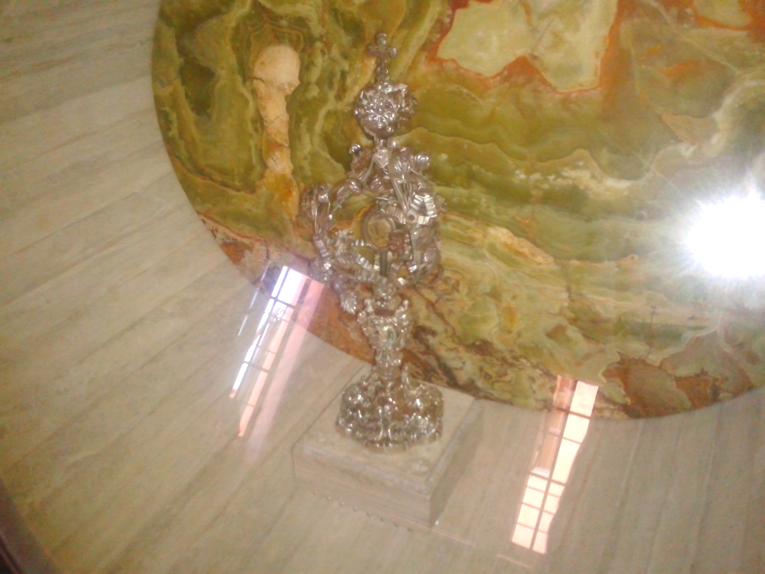 Palmi (RC). Il reliquario del Sacro Capello, all'interno della teca, custodito nella Concattedrale di San Nicola.